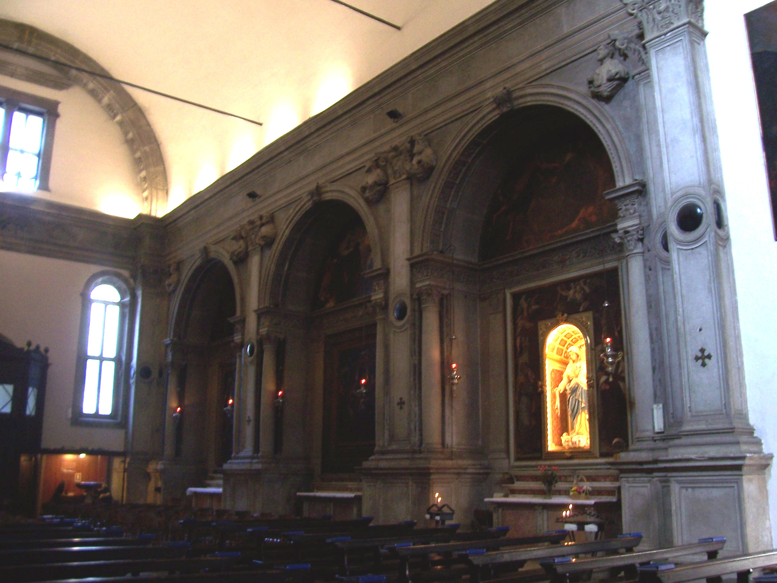 san pietro in oliveto interno sinistro.jpg